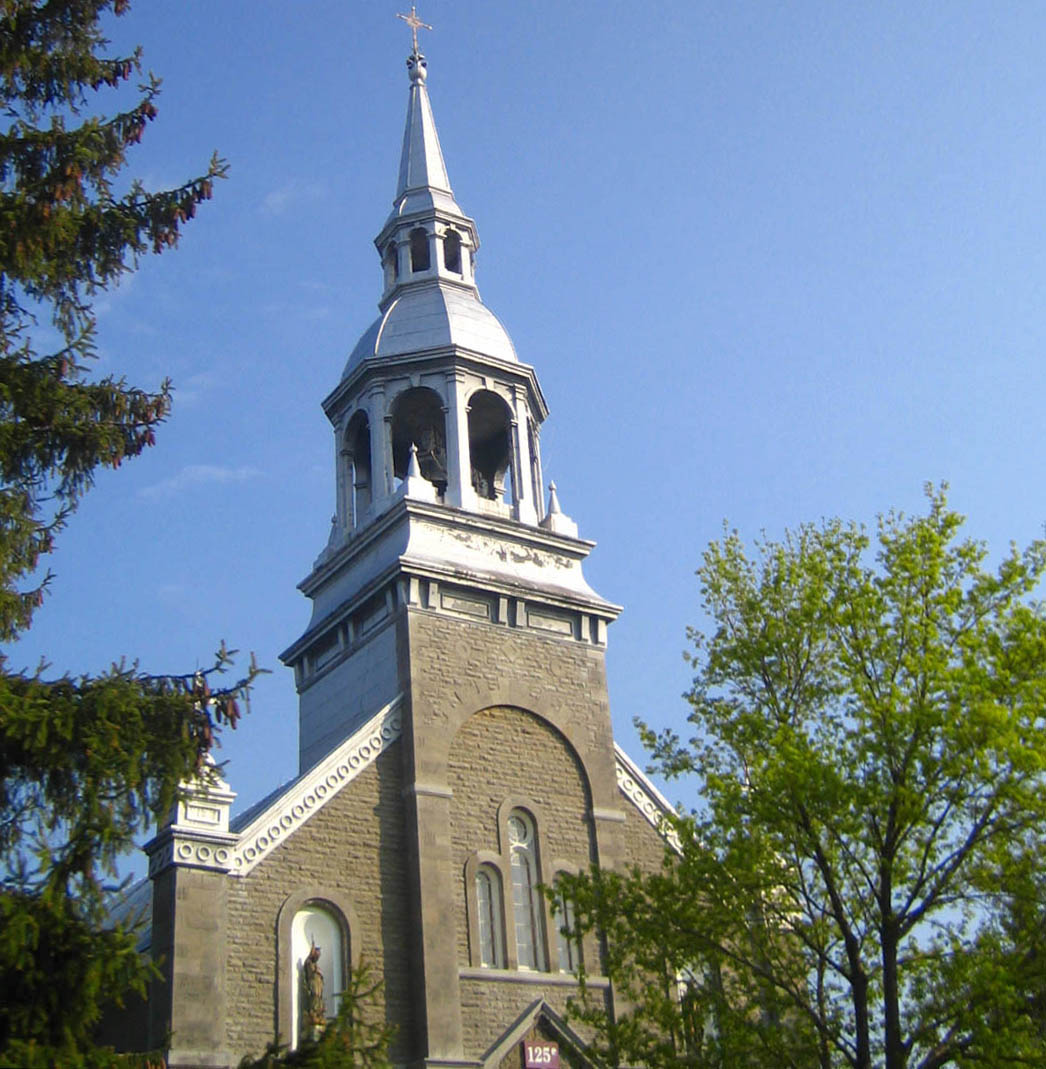 Église de Saint-Télesphore (photo personnel 2005) Utilisateur:FRED